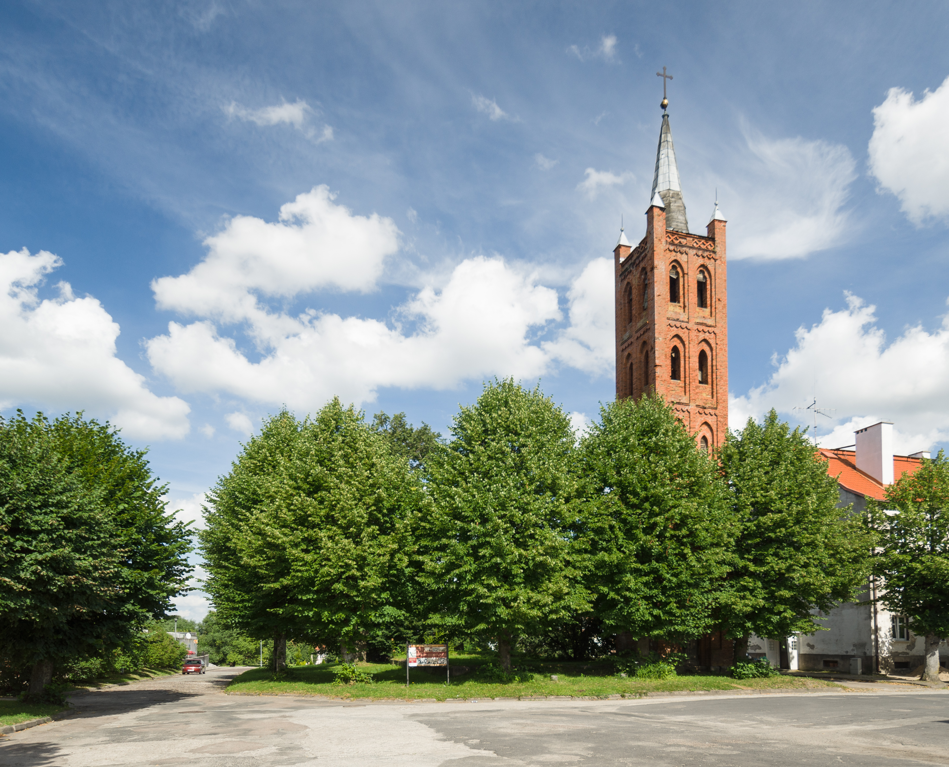 Ruiny kościoła ewangelickiego w Pieniężnie.